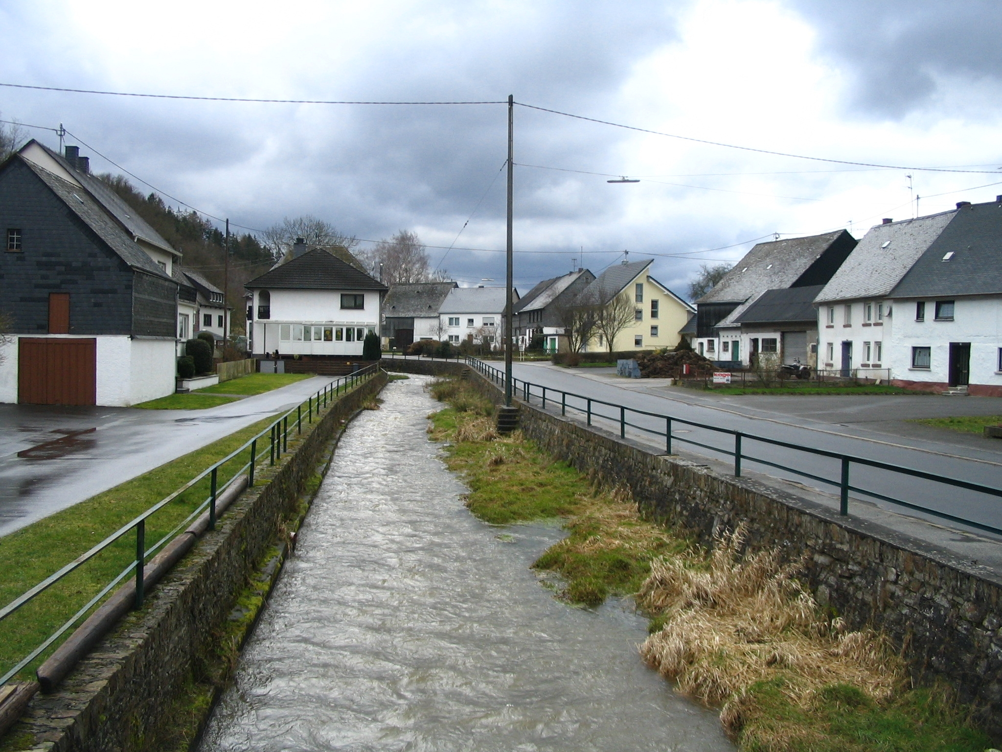 Der Idarbach in der Ortslage von Krummenau, Hunsrück